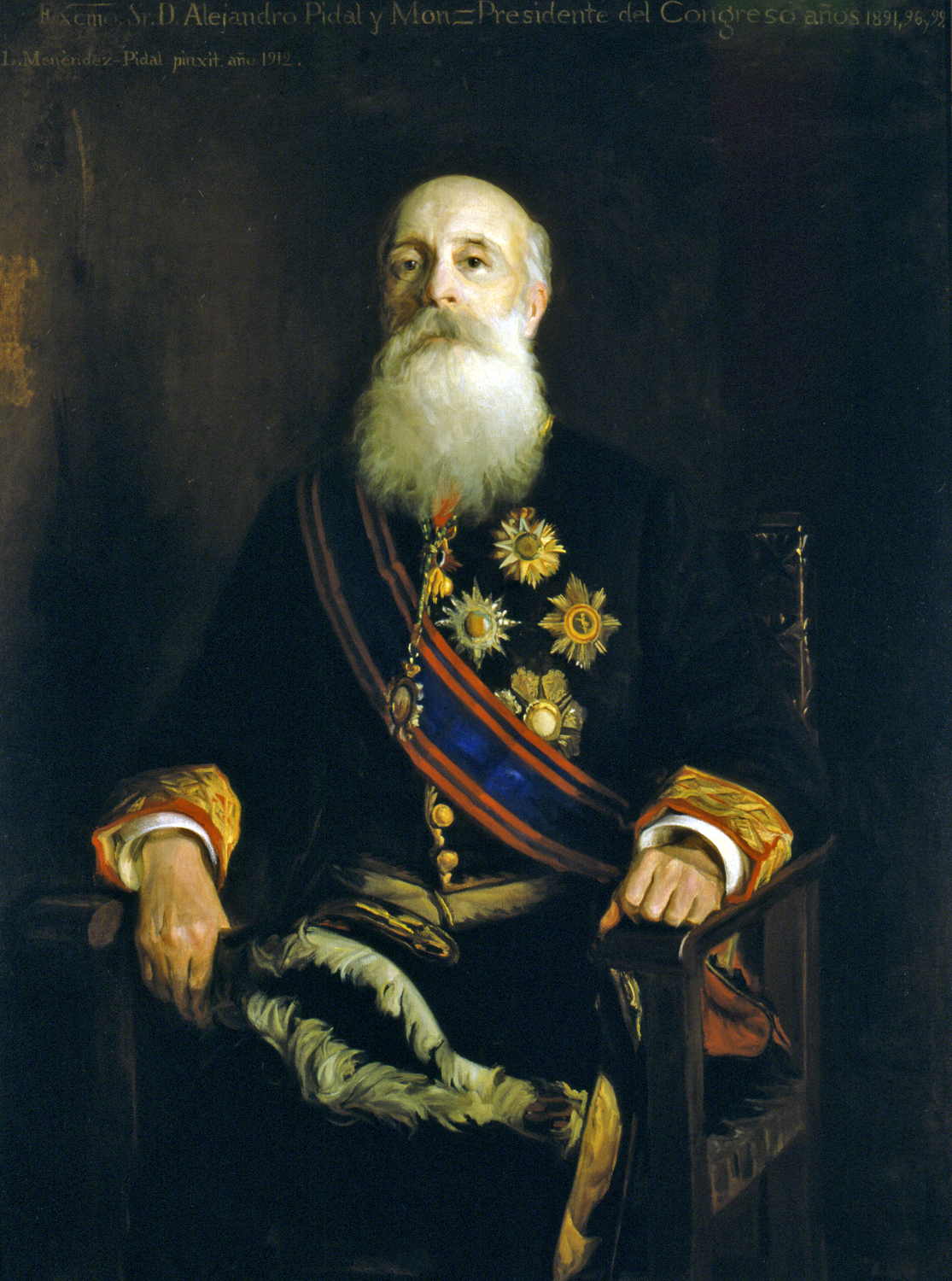 Retrato del político español Alejandro Pidal y Mon (1846-1913), que llegó a ser ministro de Fomento en 1884, durante uno de los mandatos de Antonio Cánovas del Castillo, miembro y director de la Real Academia Española, numerario de la Real Academia de la Historia, presidente del Congreso de los Diputados y embajador de España ante la Santa Sede. También fue caballero de la Orden del Toisón de Oro y caballero gran cruz de la Orden de San Gregorio Magno.